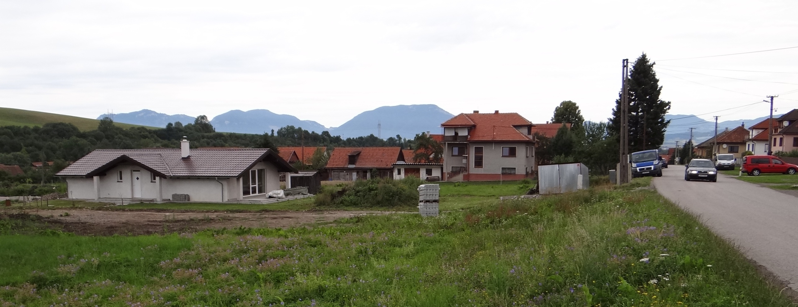 Galovany